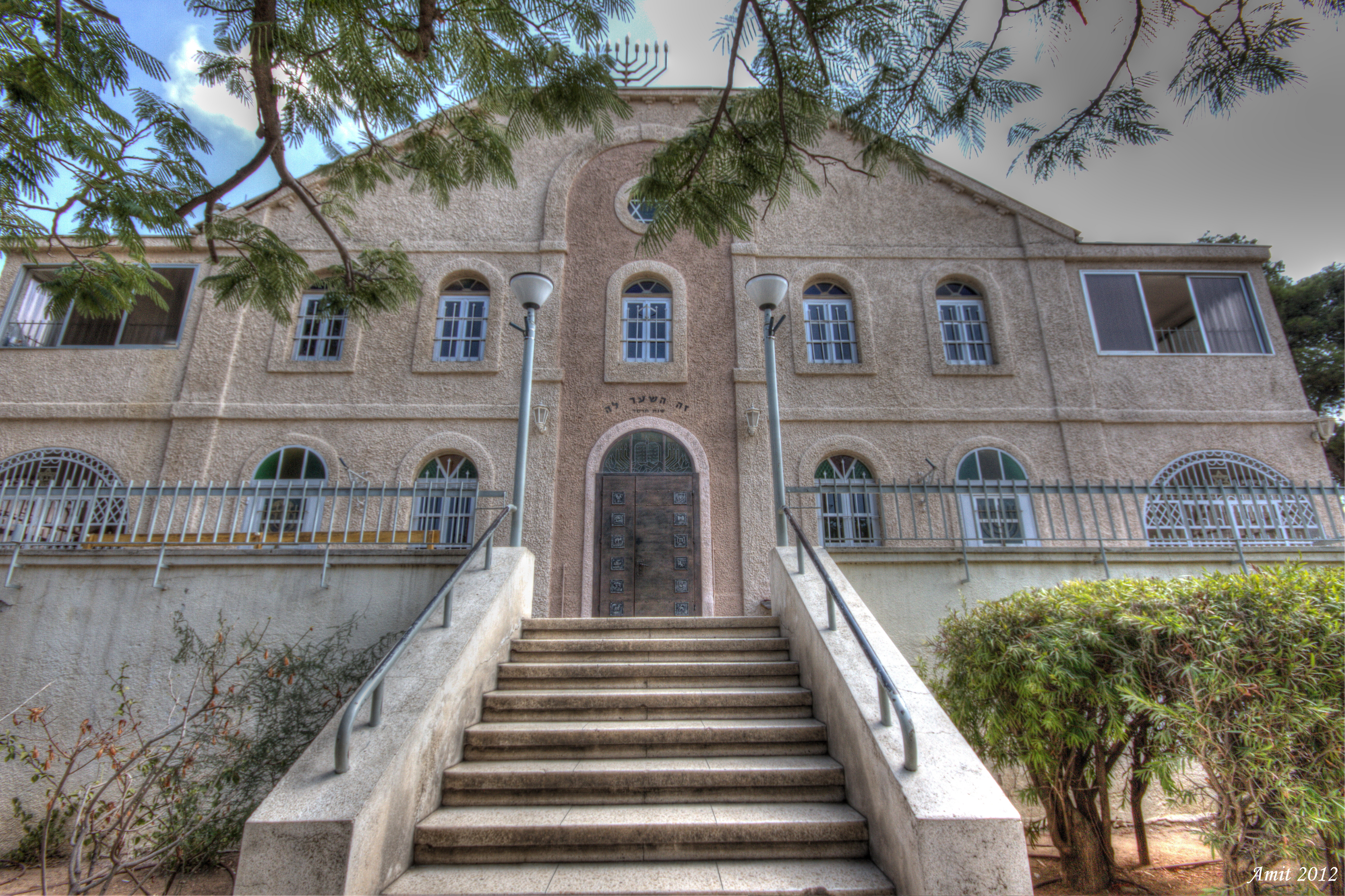 בית הכנסת הגדול "אוהל שרה" - בית הכנסת הראשון של רחובות, נבנה בשנת תרס"ד? ובהמשך שופץ והורחב והיה למוקד הקהילתי והחברתי של המושבה הצעירה.להיכנס